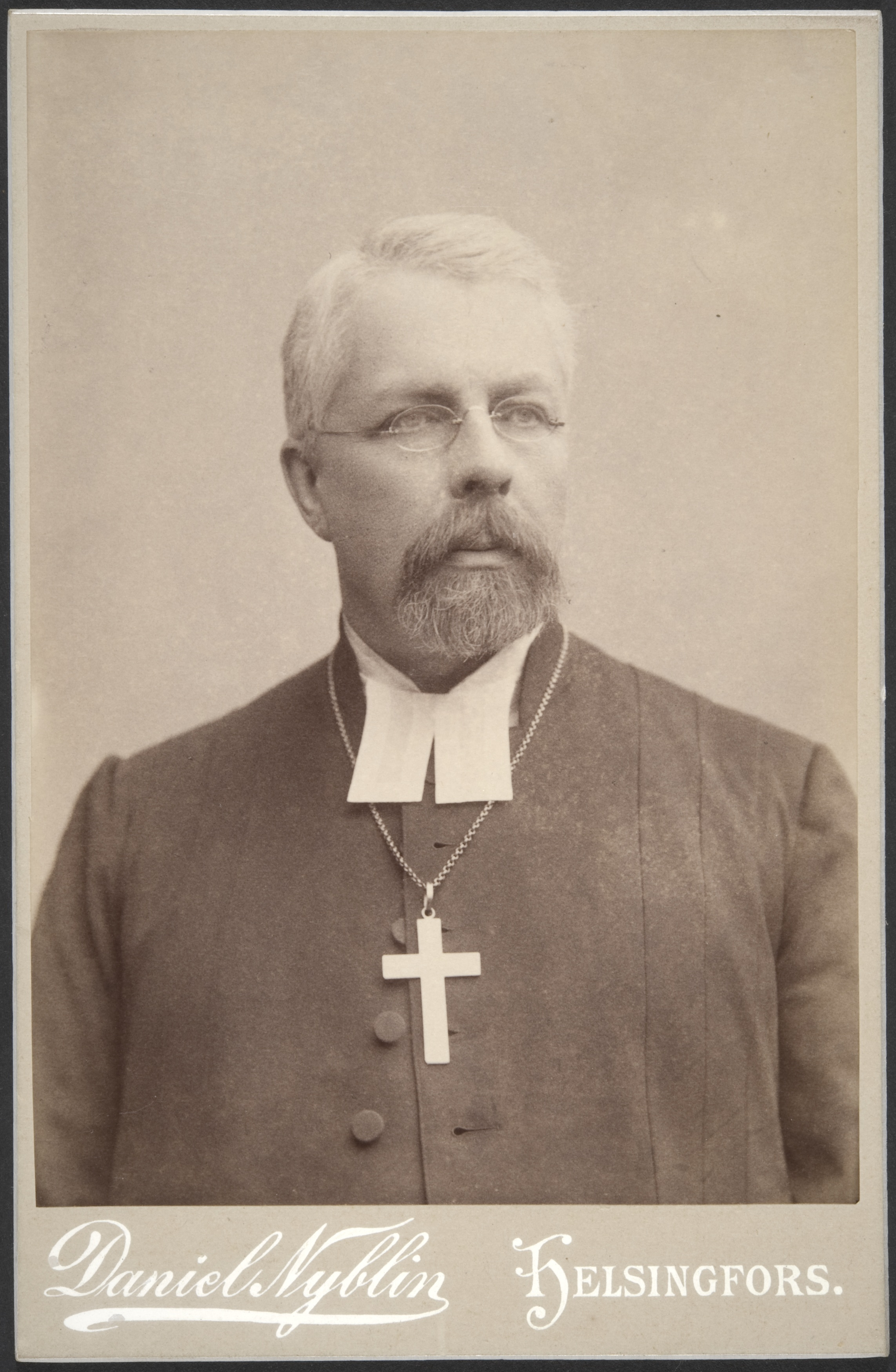 Description